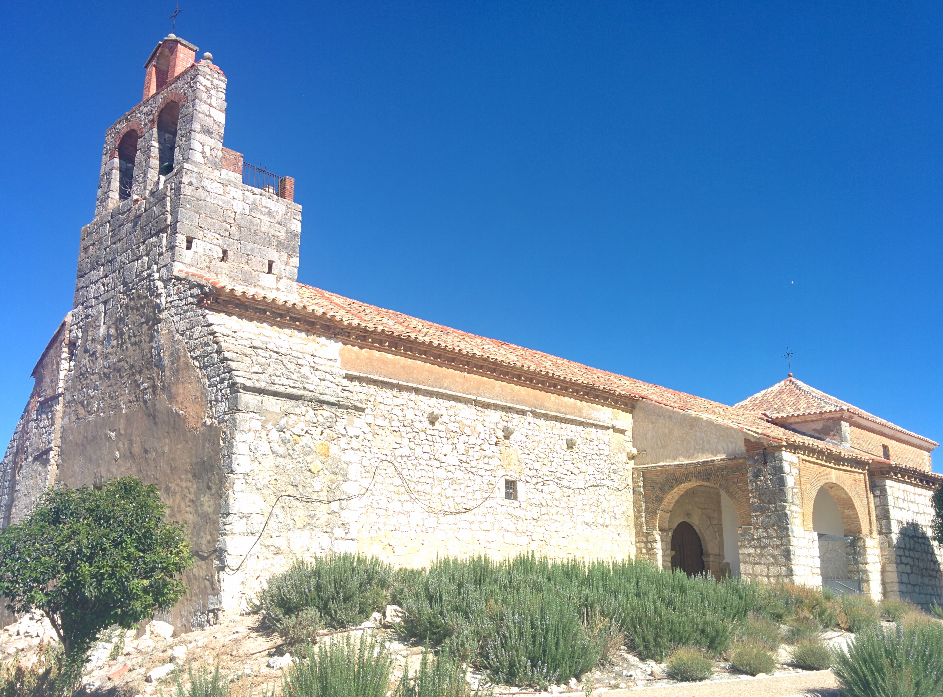 Iglesia de Nuestra Señora del Templo, en Castromembibre (Valladolid, España).